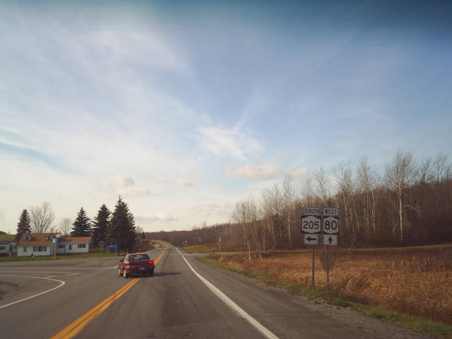 M3367S-4504